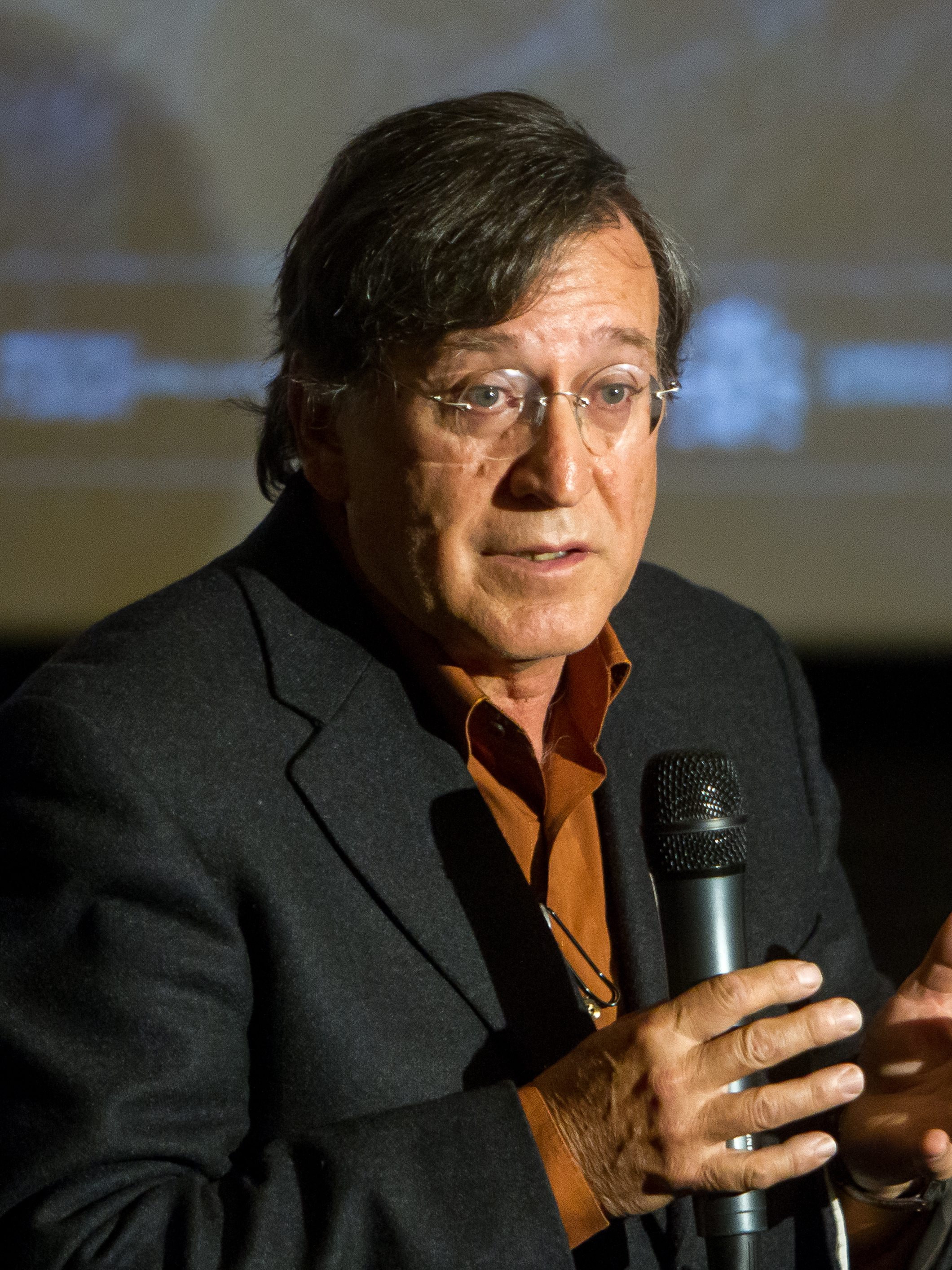 Presentación de la película 'Cantábrico' en los cines Príncipe de Donostia-San Sebastián (7 de marzo de 2017)